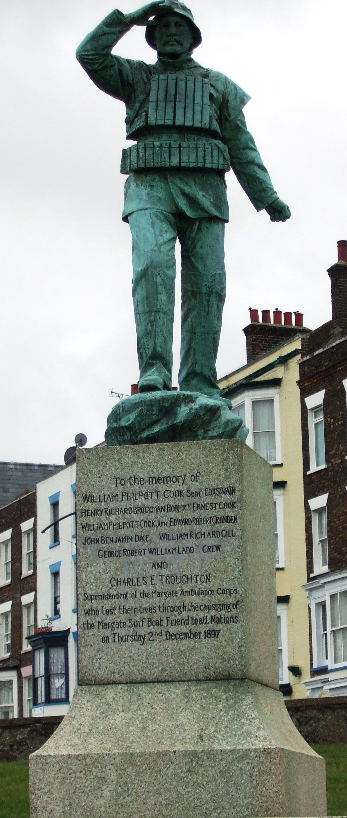 Surfboat Memorial at Margate